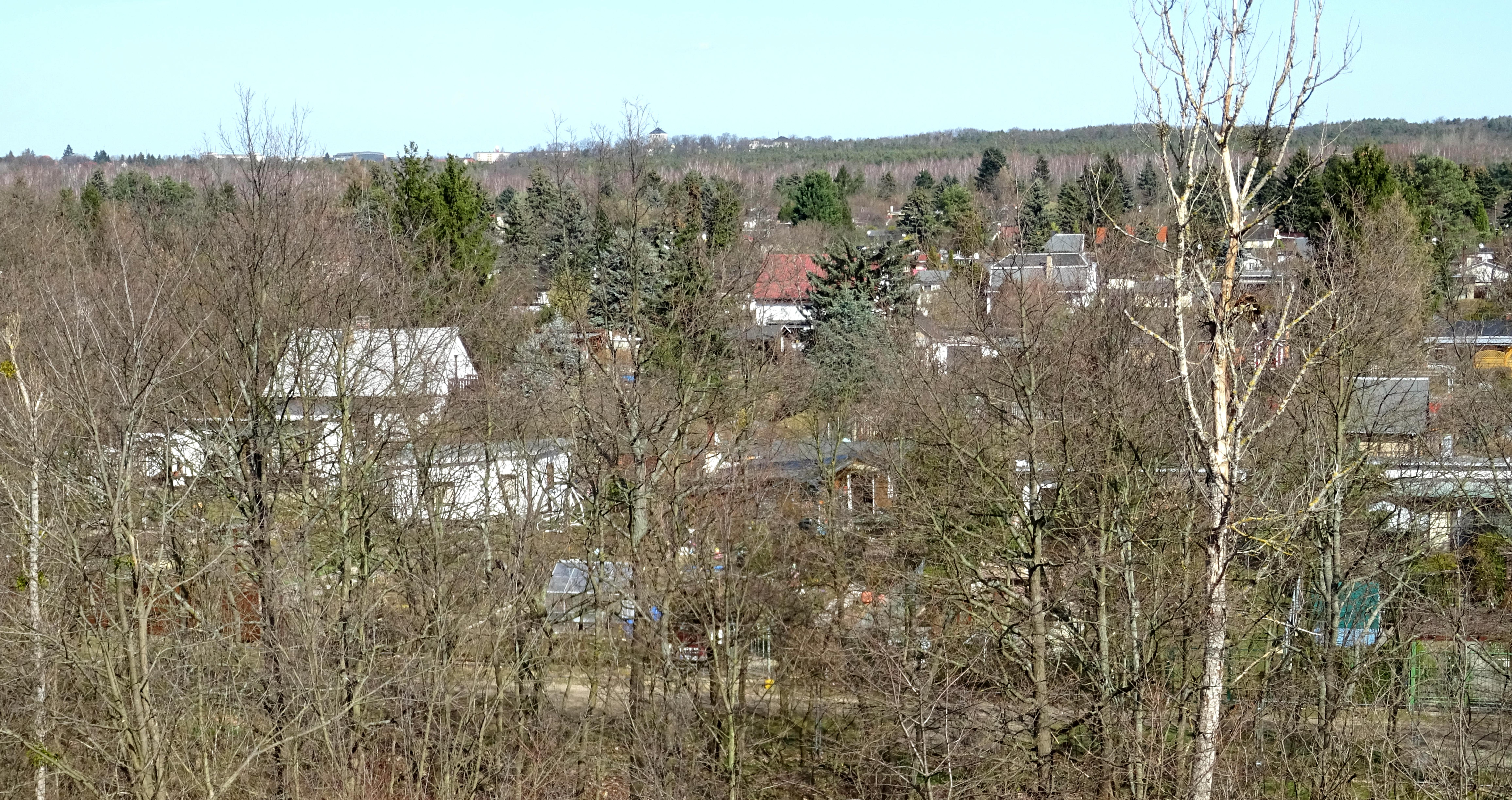 Hellerberge, Hellersiedlung am 16. März 2019